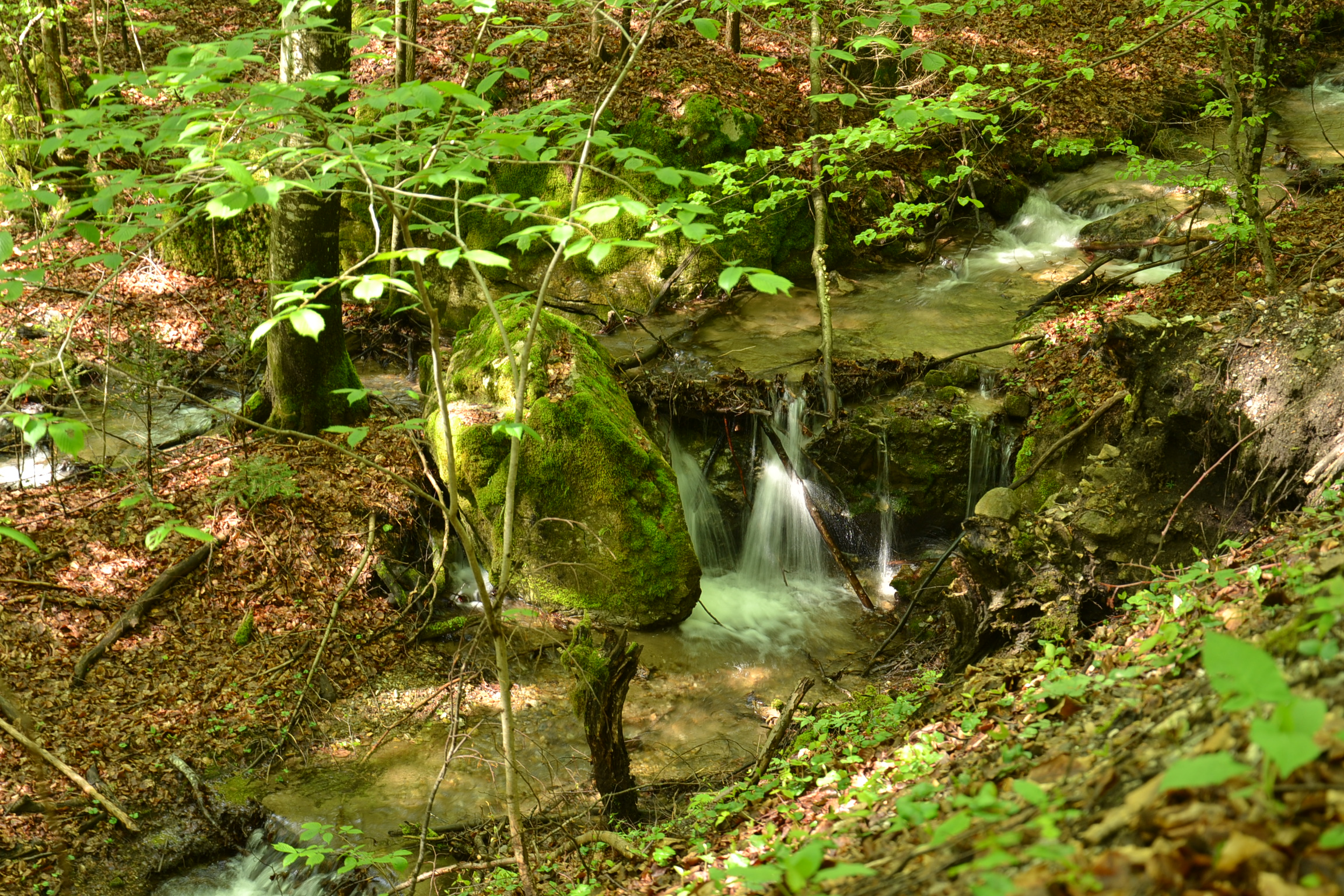 Muránska planina - Hrdzavý potok